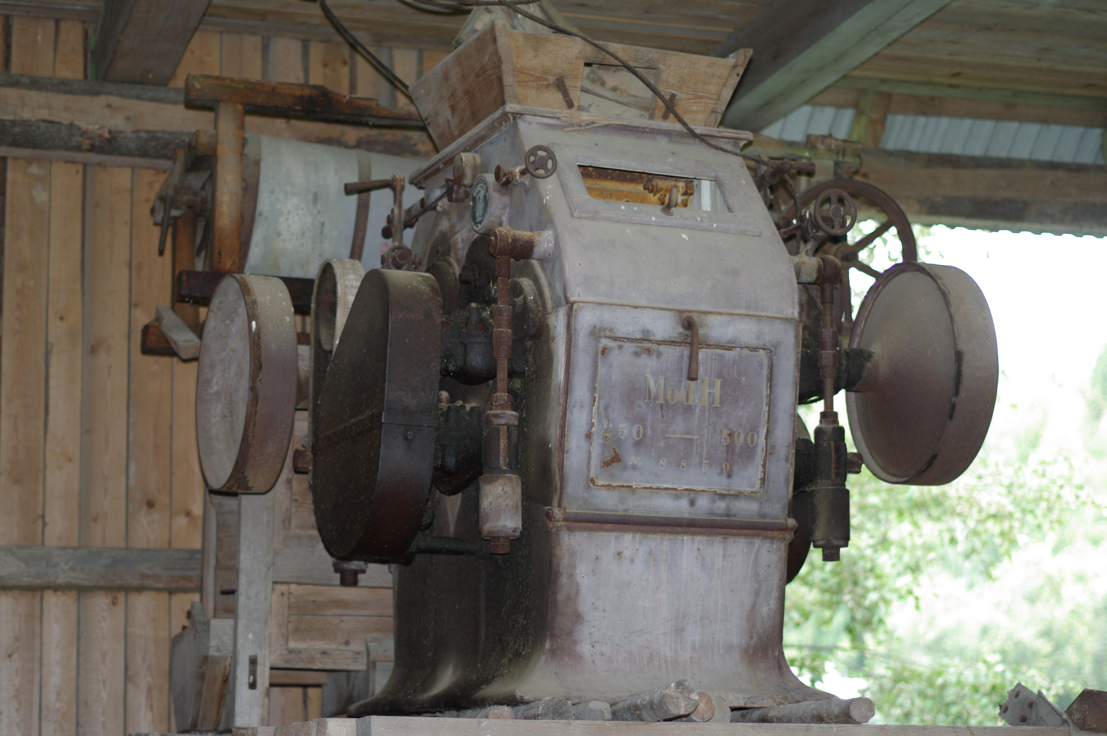 Sänna mõisa vesiveski